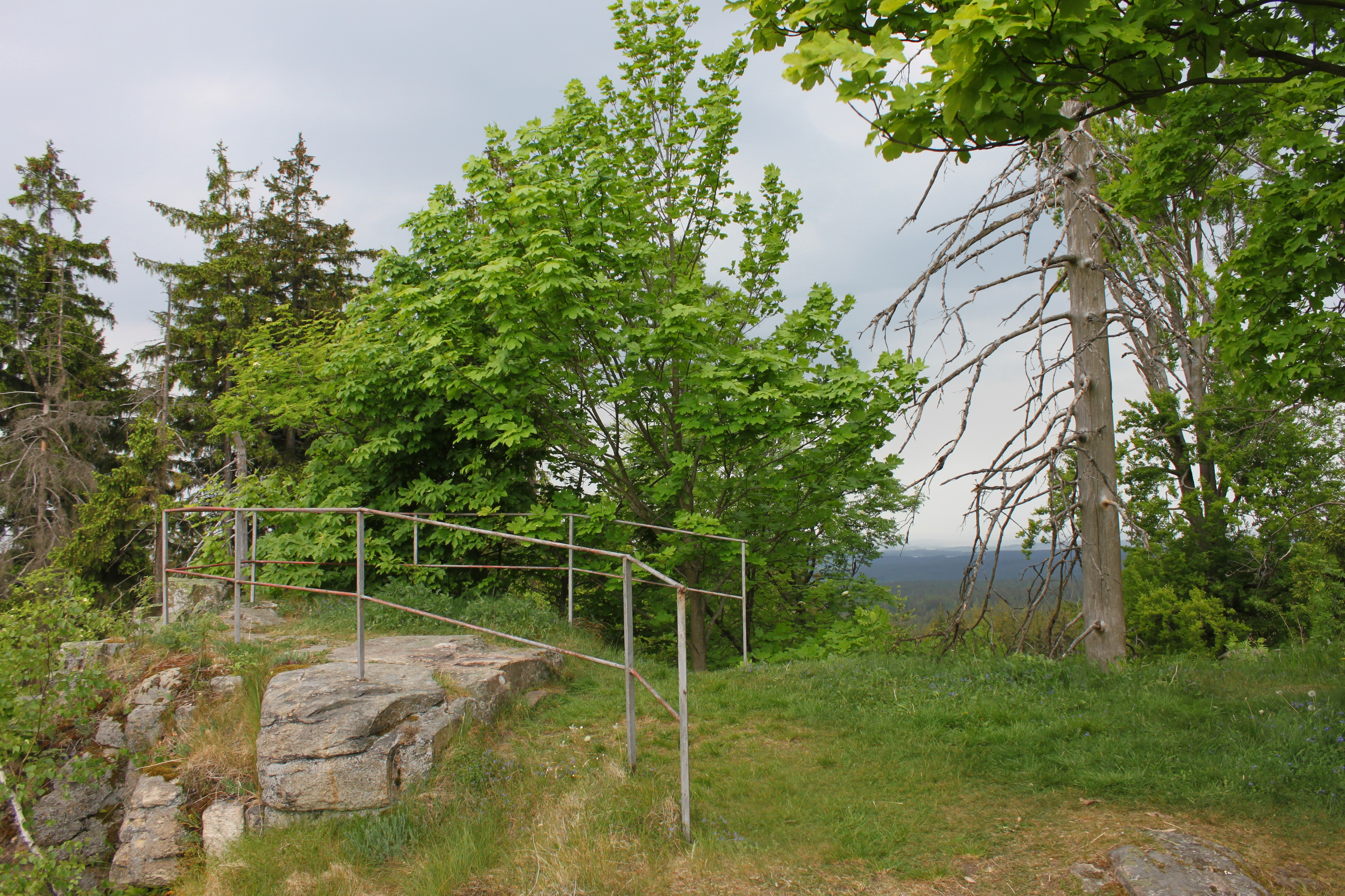 Die Ruine Hirschstein ist eine ehemalige Höhenburg am Westhang des Großen Kornbergs im Fichtelgebirge